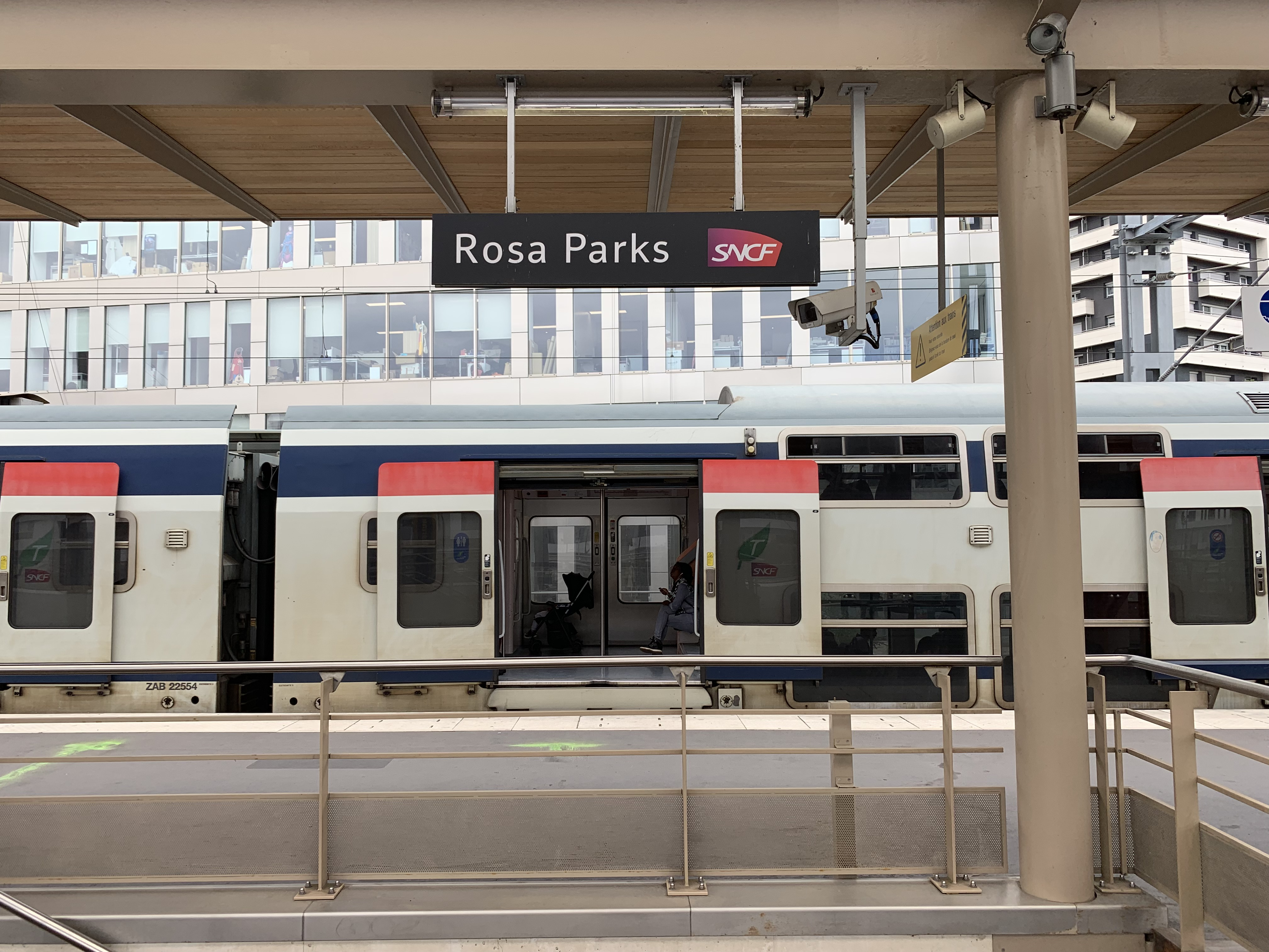 Gare Rosa-Parks, Paris.